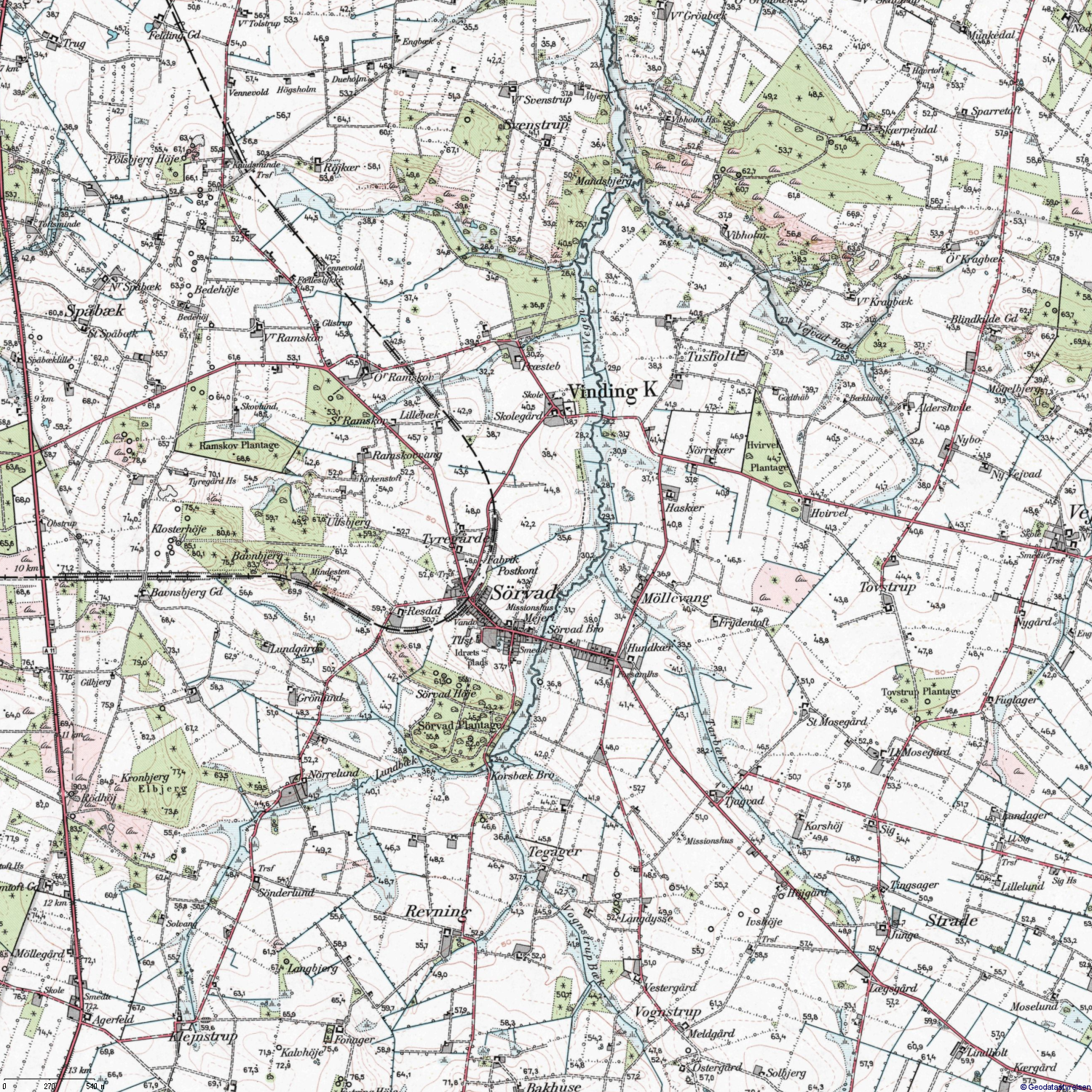 Udsnit af 4 cm kort i 1:25.000, målt 1957-1969